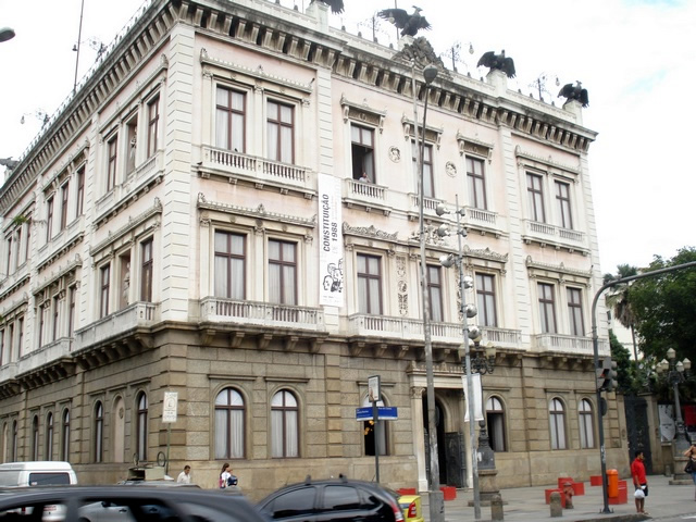 Palácio do Catete : Fachada principal. Cidade do Rio de Janeiro, Brasil.